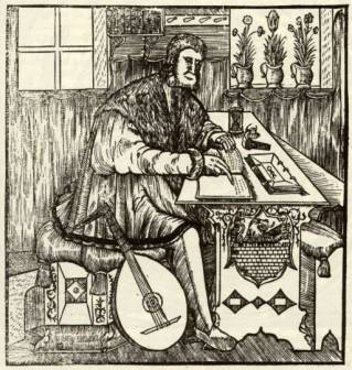 Holzschnitt: Marcin Bielski im Arbeitszimmer beim Schreiben.